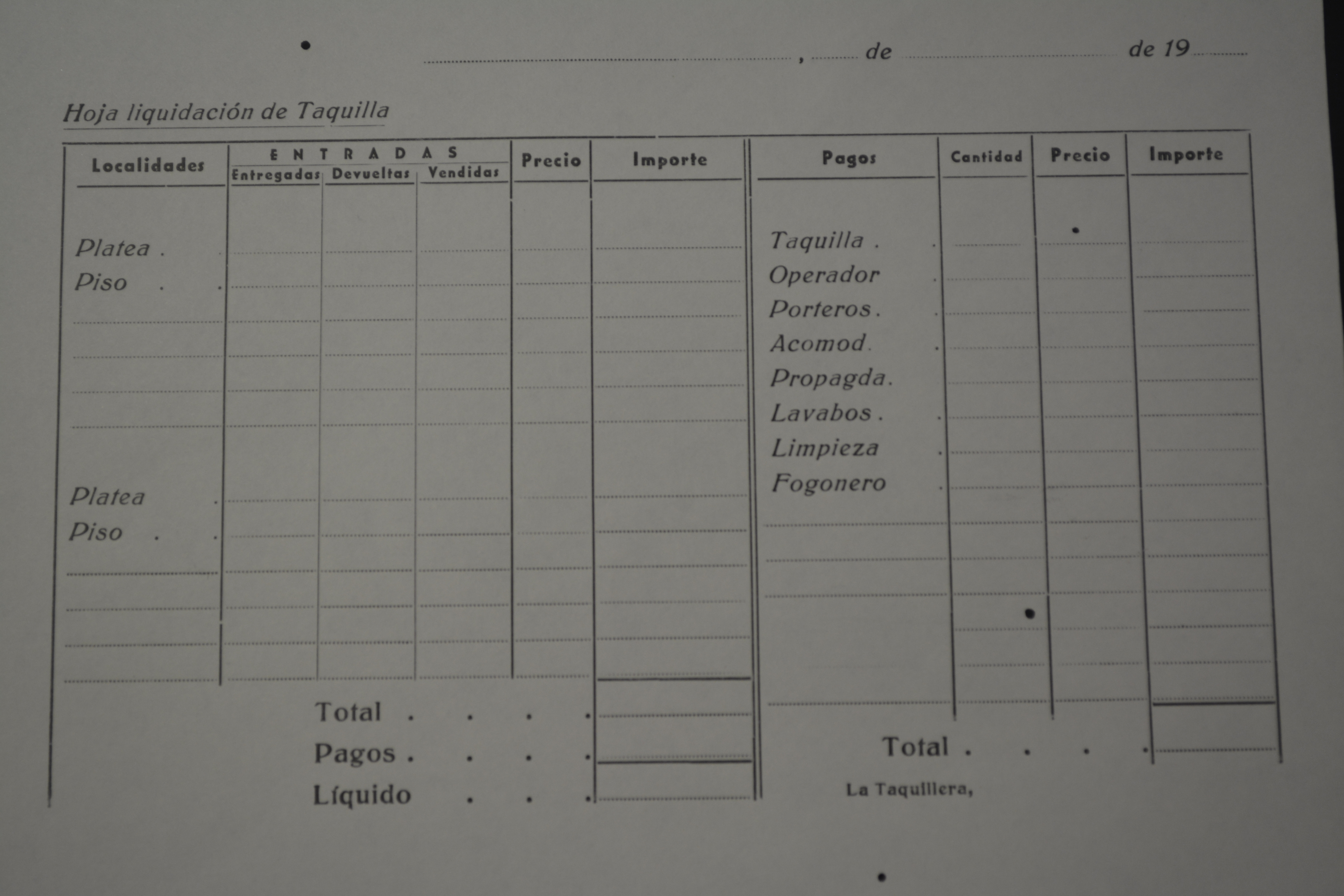 Imatge d'una fulla de liquidació del cinema Victòria (Palafrugell) (fons Círculo Mercantil - Arxiu Municipal de Palafrugell)